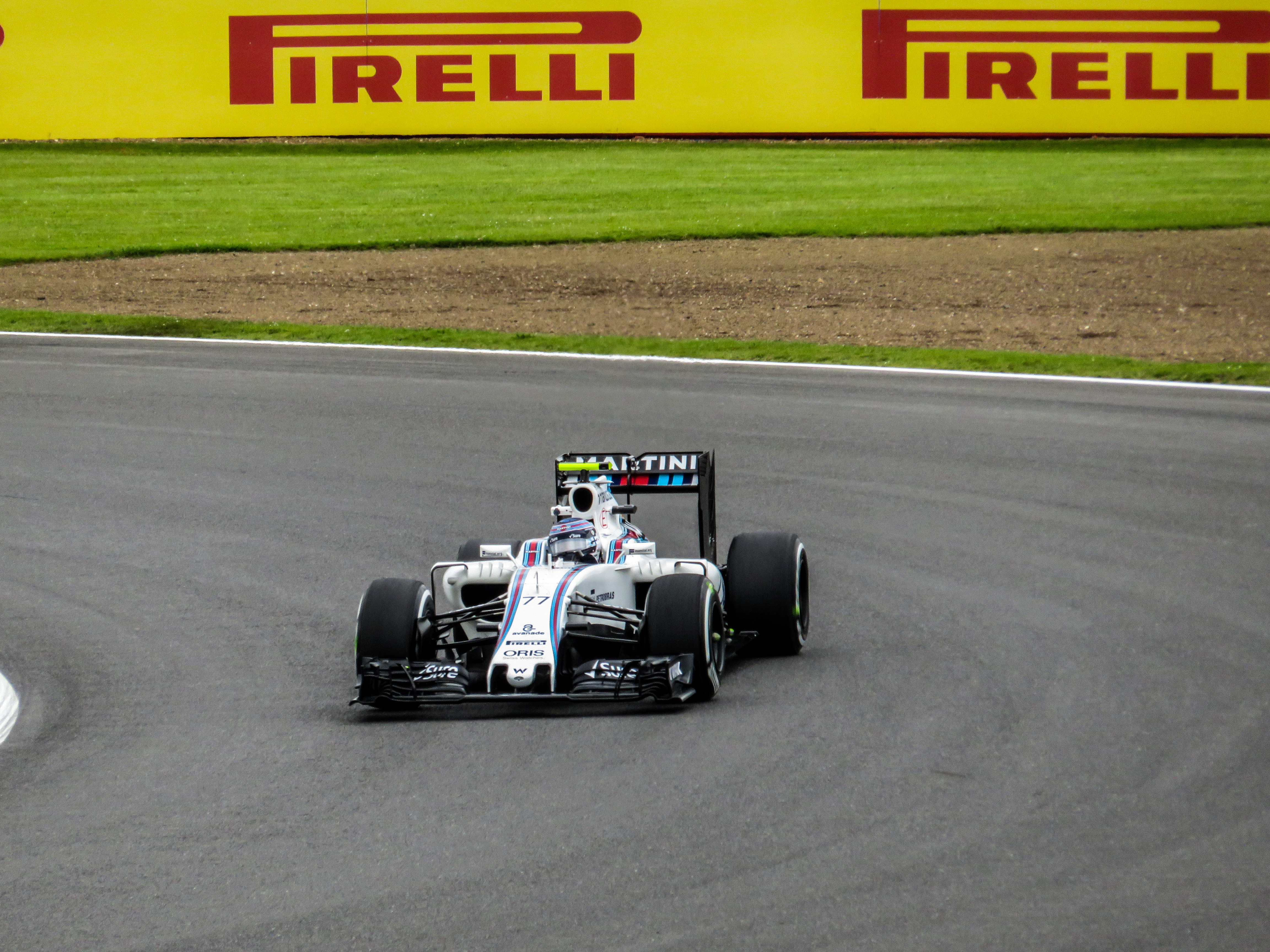 F1 - Williams F1 - Valtteri Bottas